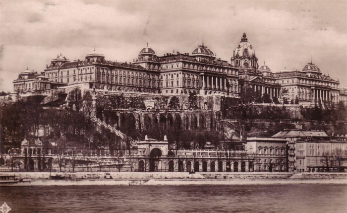 A budai palota az 1930-as években